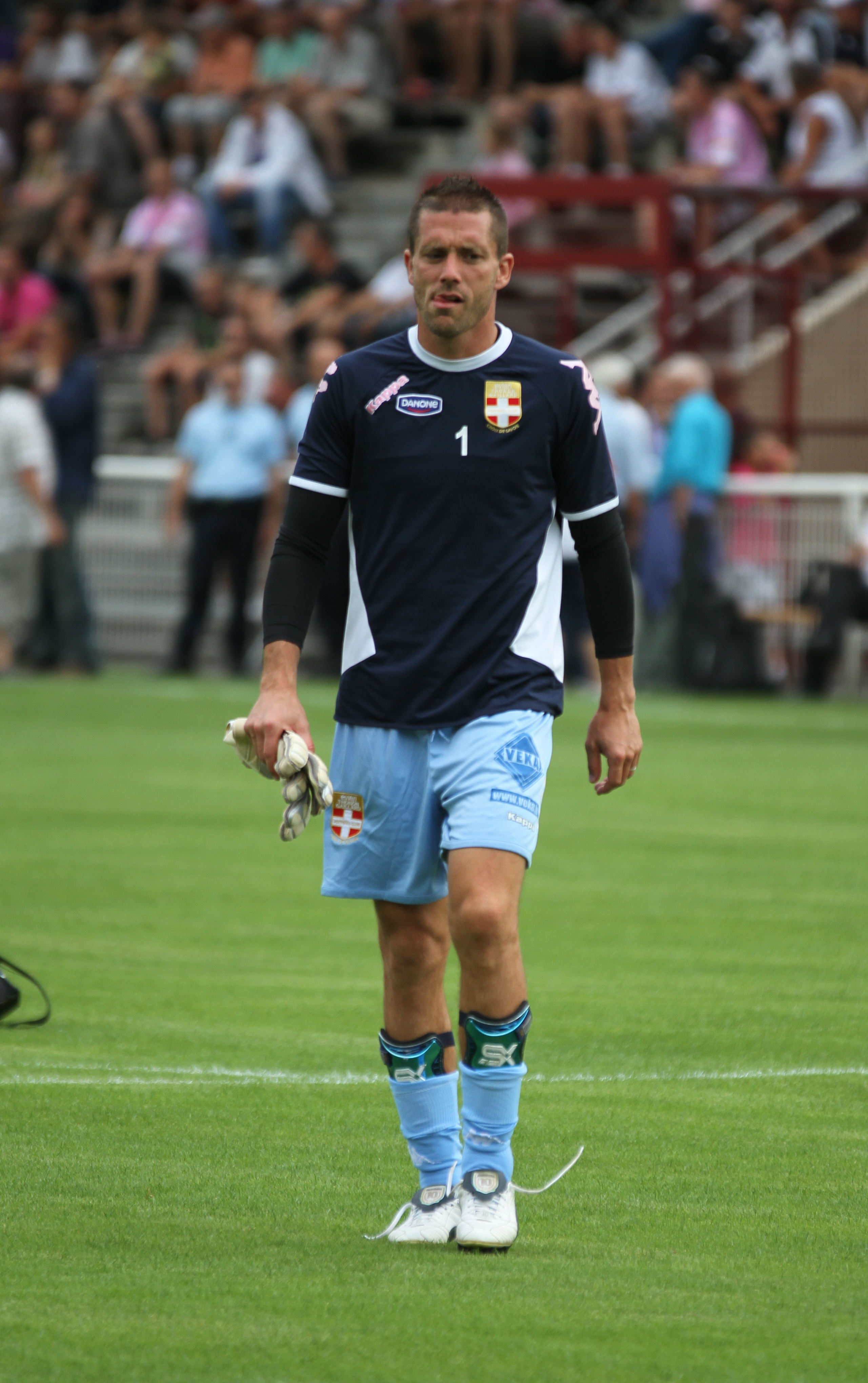 Johann Durand avant le match evian-Thonon-Gaillard - Bastia